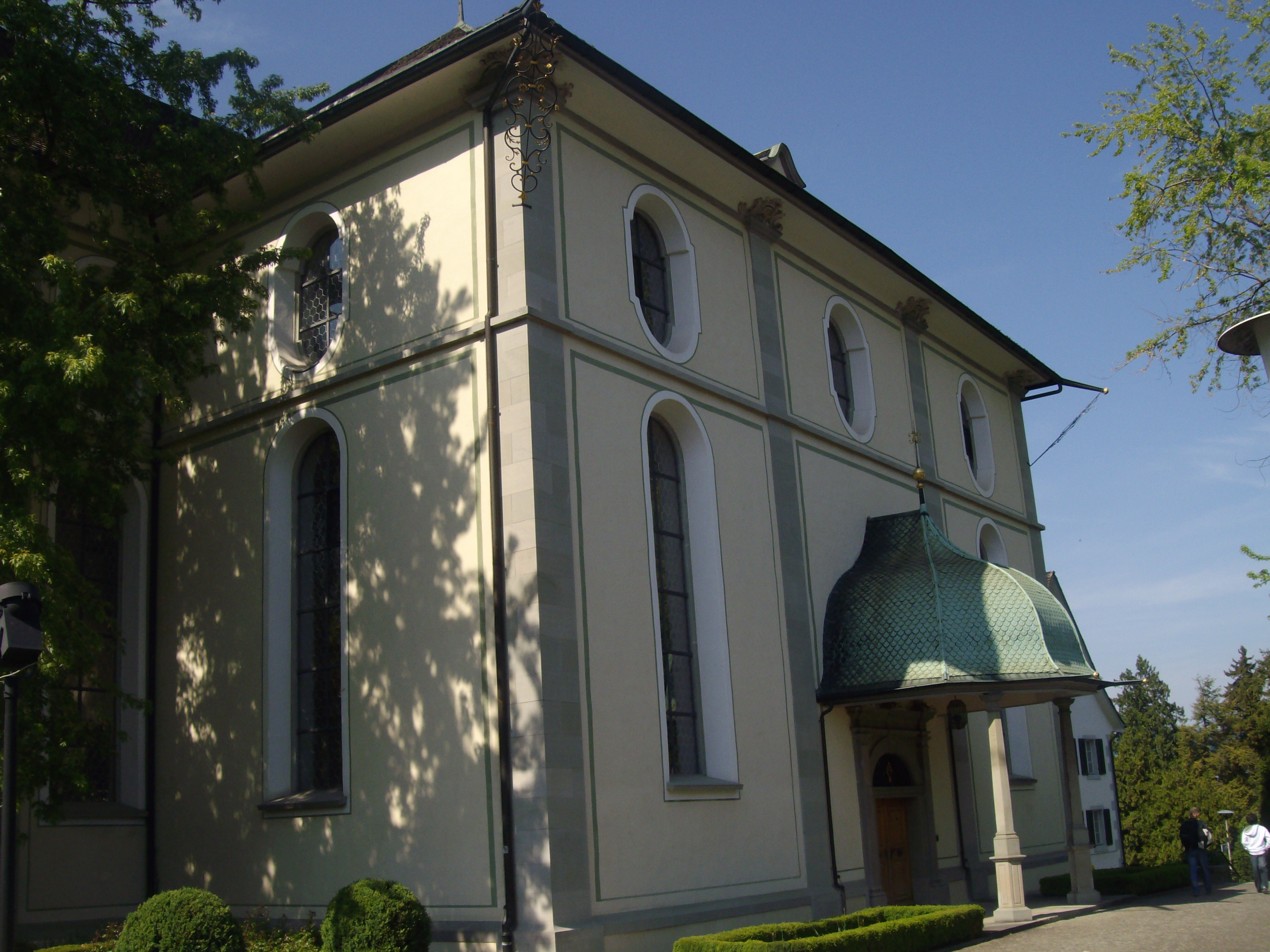 Reformierten Kirche Wädenswil (1764-1767), Seitenfassade